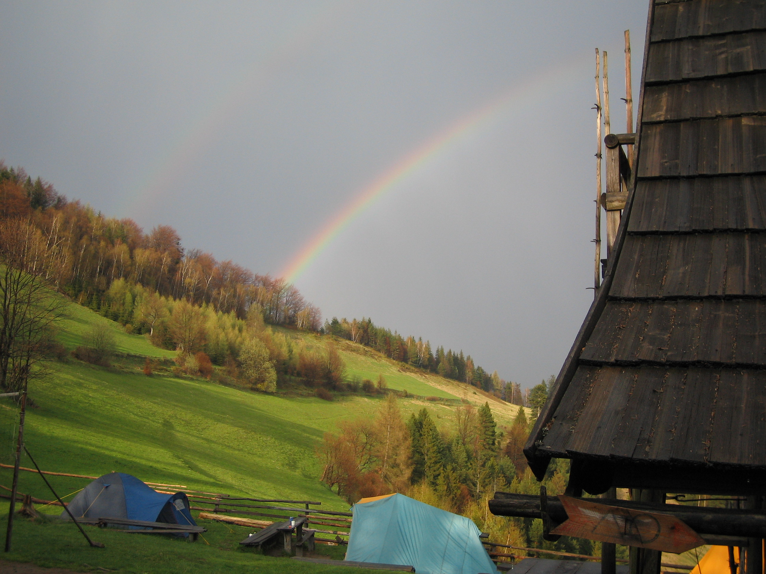 Widok z Chatki na Trześniowym Groniu (pod Niemcową a nie na Niemcowej) w Maju 2008